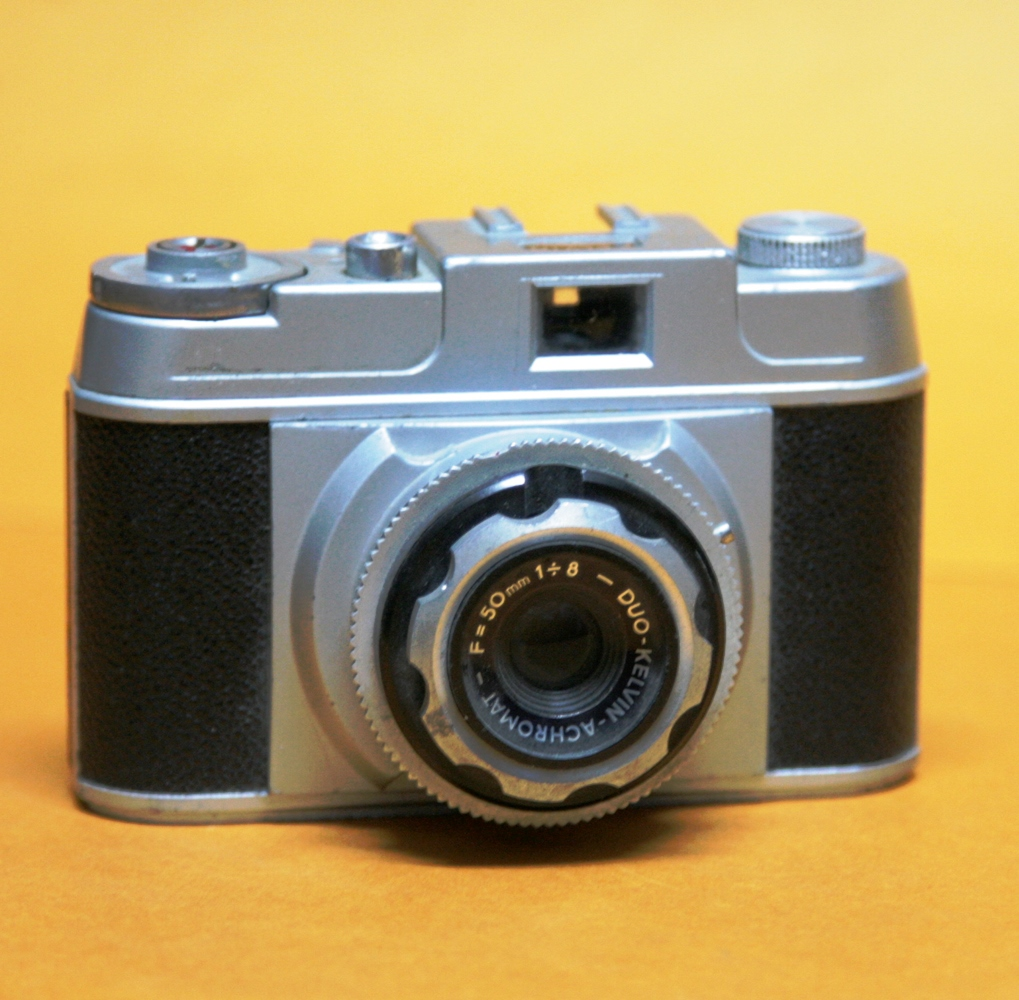 Coll. Marcè CL - Macchina fotografica in miniatura Kelvin minor achromat 1952-1962 fabbricata in Italia